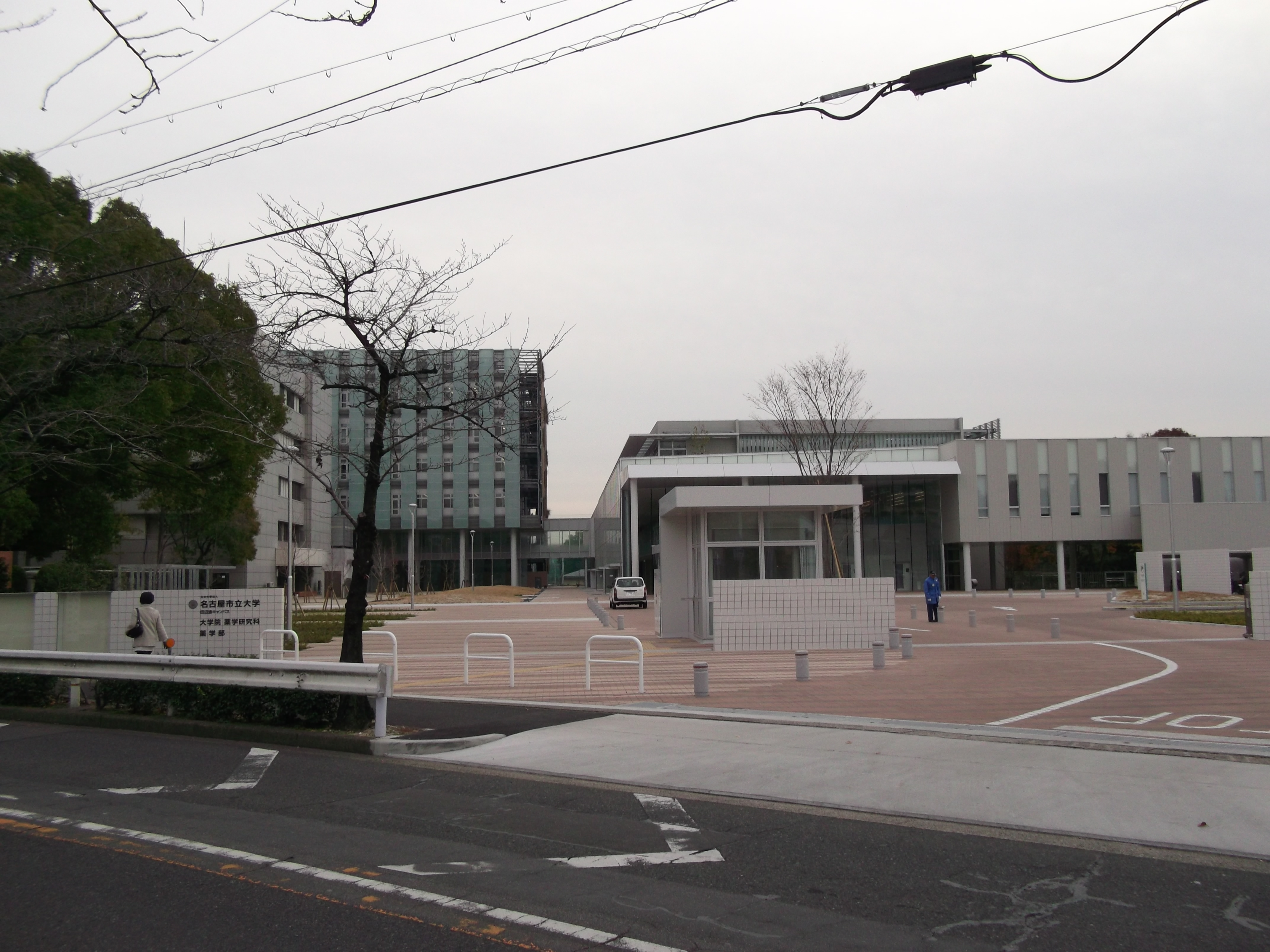 名古屋市瑞穂区田辺通にある名古屋市立大学田辺通キャンパスを北側から写す